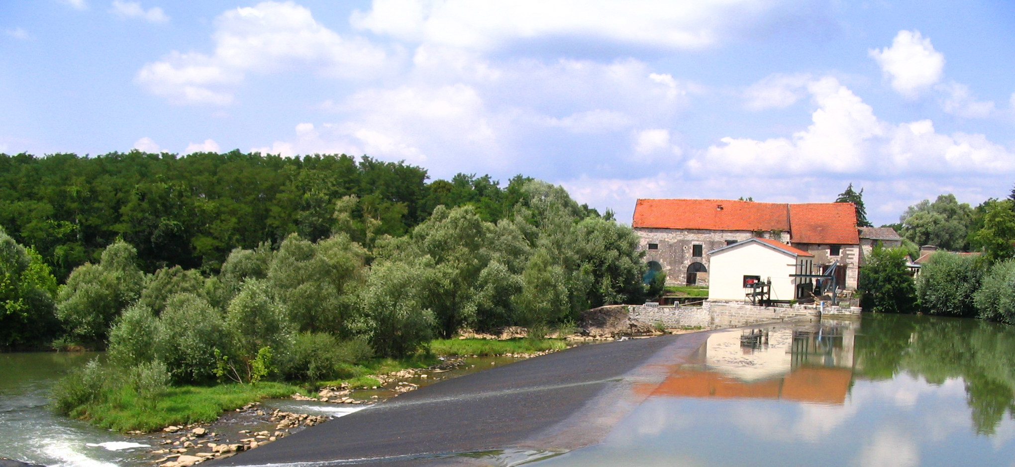 Vue des Forges de Pesmes, canal d'amenée sur l'Ognon et bâtiment des hauts-fourneaux - Pesmes - Haute-Sâone - France